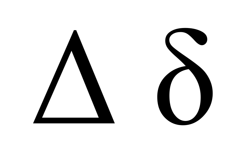 greek letter delta